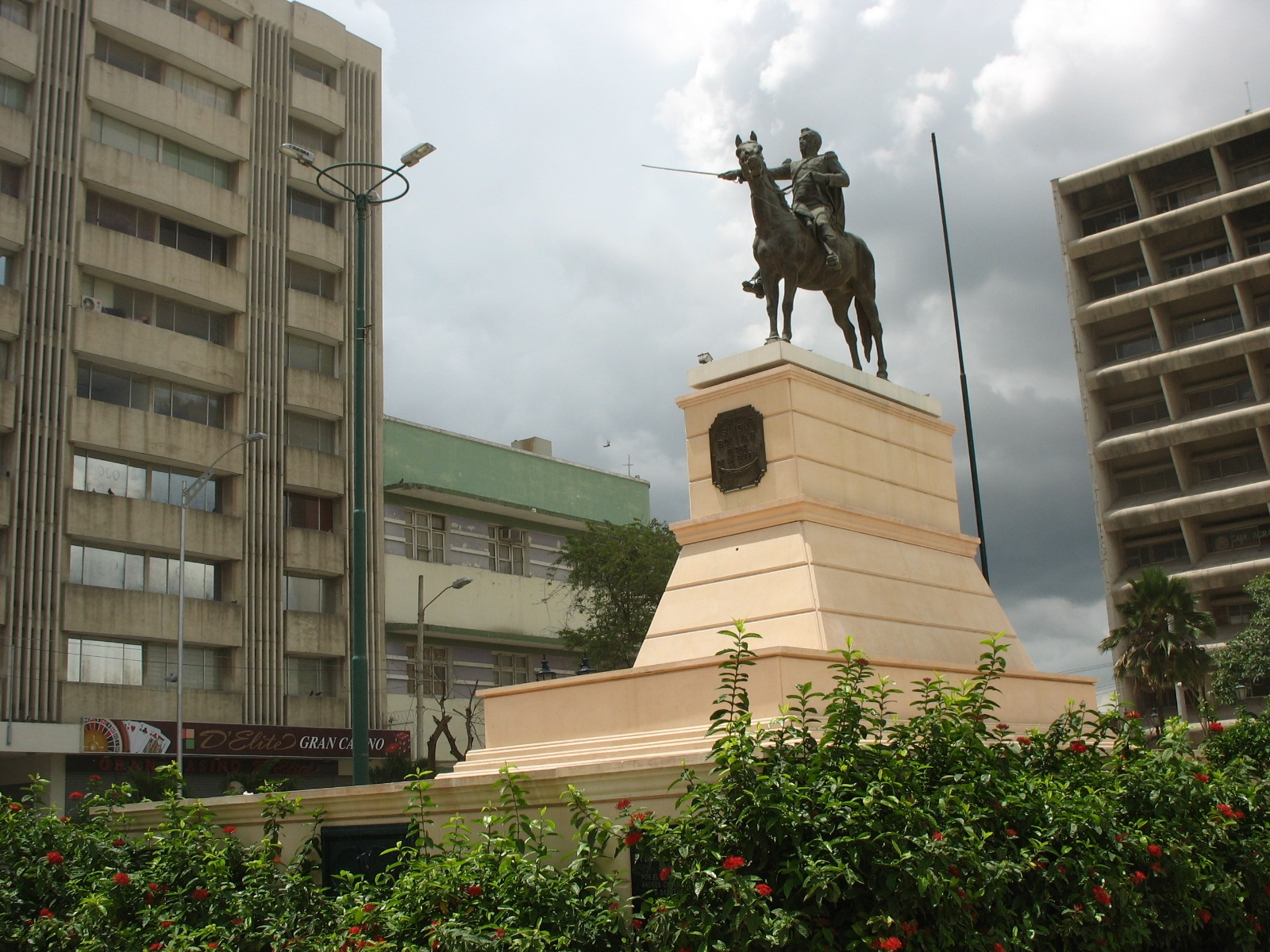 Estatua de Bolívar, Barranquilla